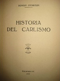 Portada de Historia del Carlismo